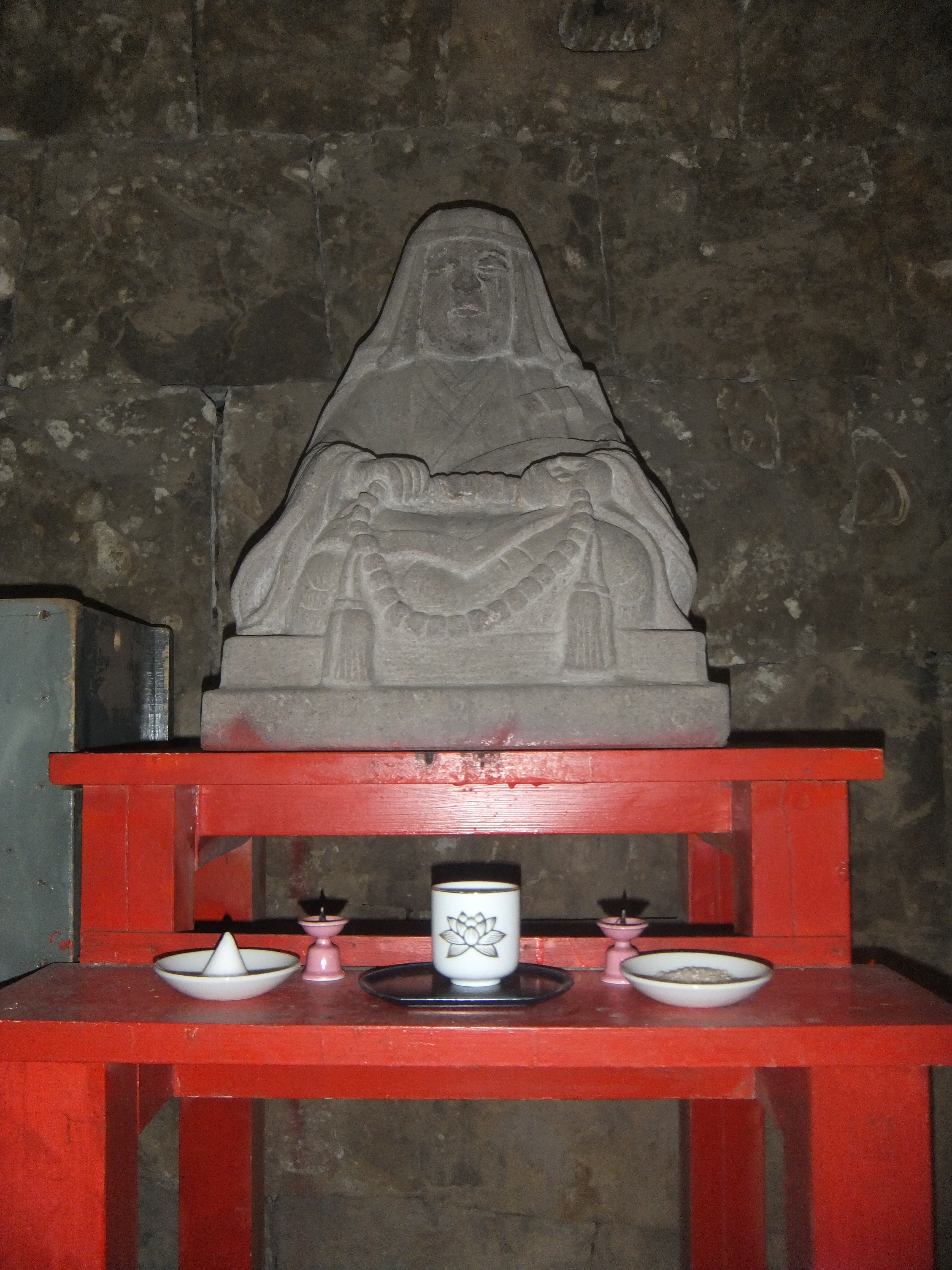 Statue of Sugiyama Waichi. Ejima-Sugiyama-Shrine (Tokyo, Sumida-ku)